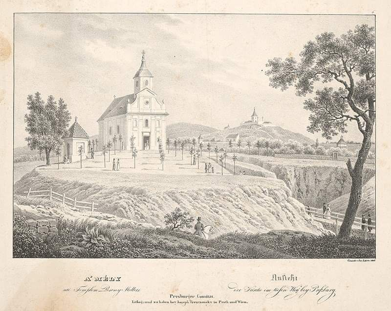 Rechts im Hintergrund ist der Preßburger Kalvarienberg zu sehen